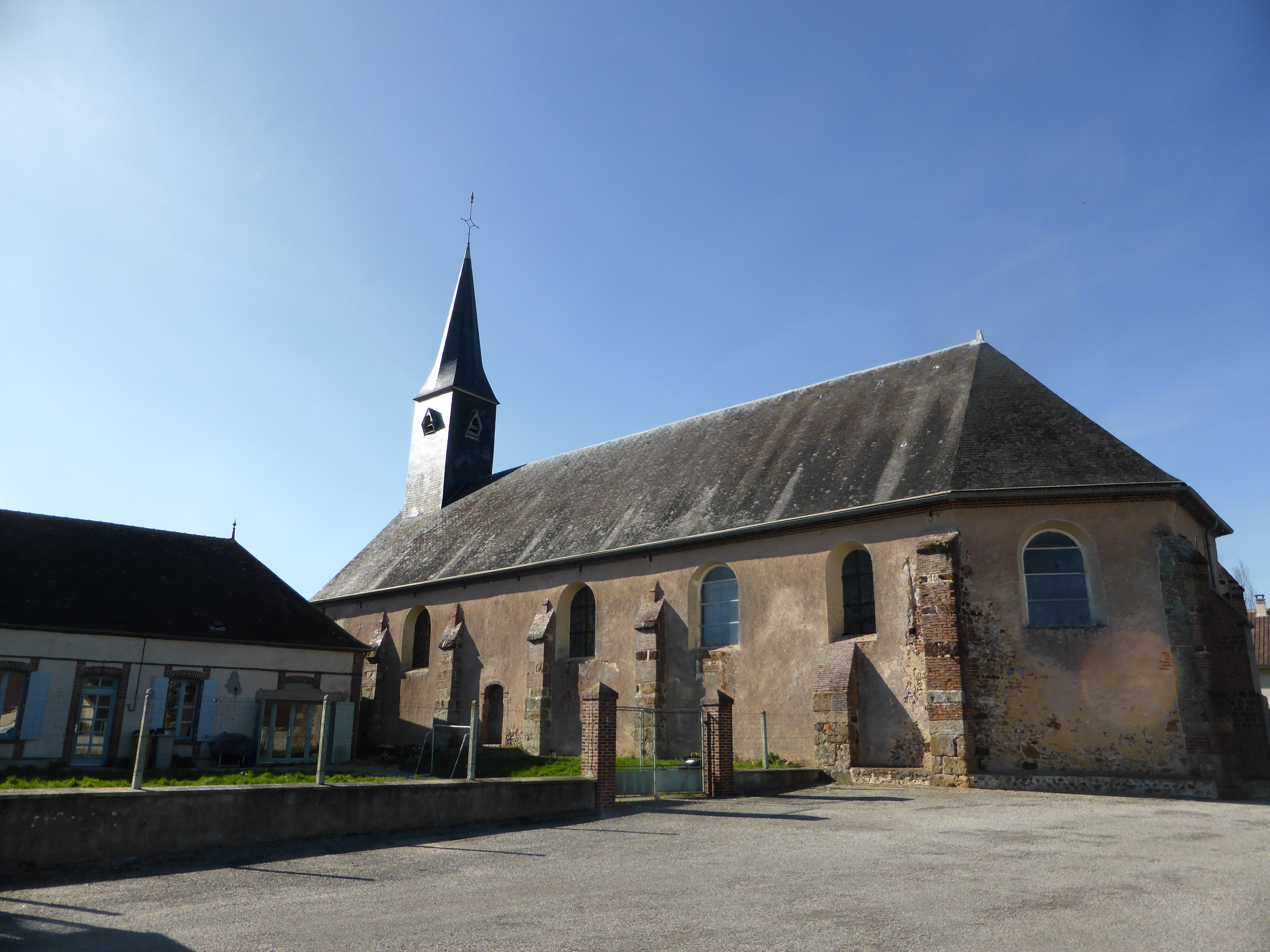 Église Saint-Même de Saint-Maixme-Hauterive, en Eure-et-Loir.